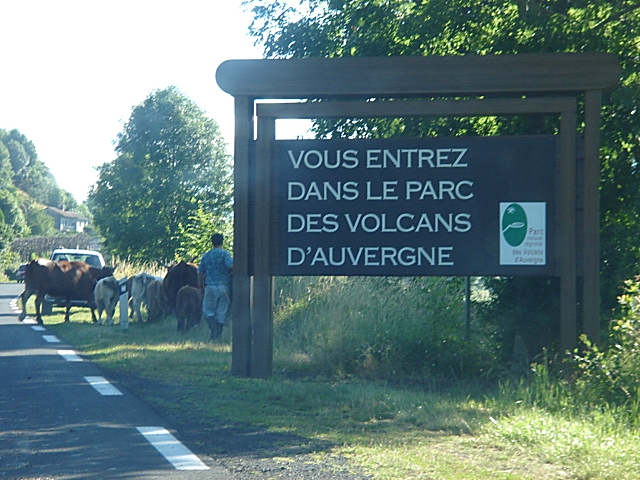 Panneau entrée parc des volcans d'Auvergne et troupeau de vaches